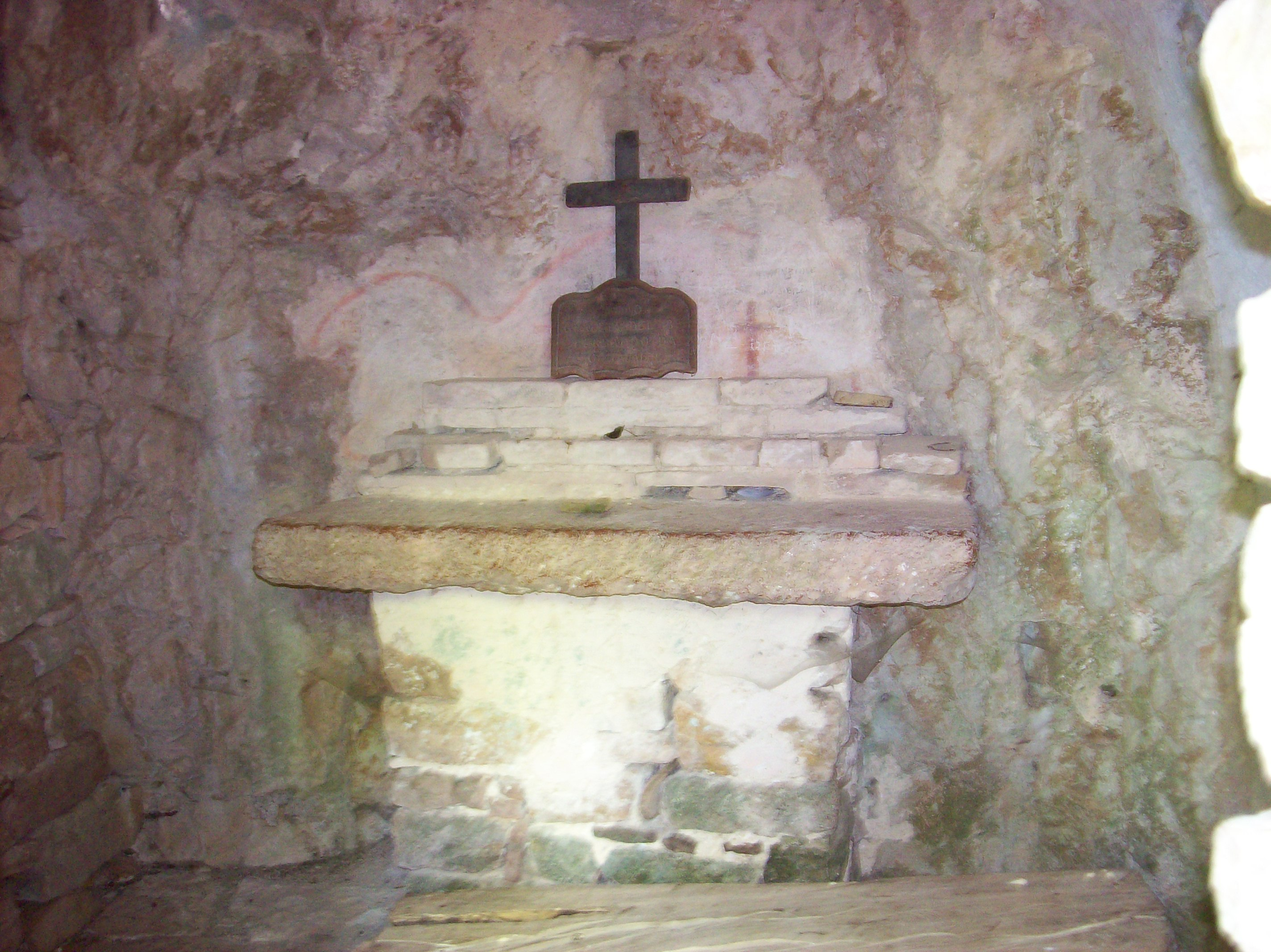 Eremo delle Carceri (Assisi). Grotta di Frate Bernardo da Quintavalle.